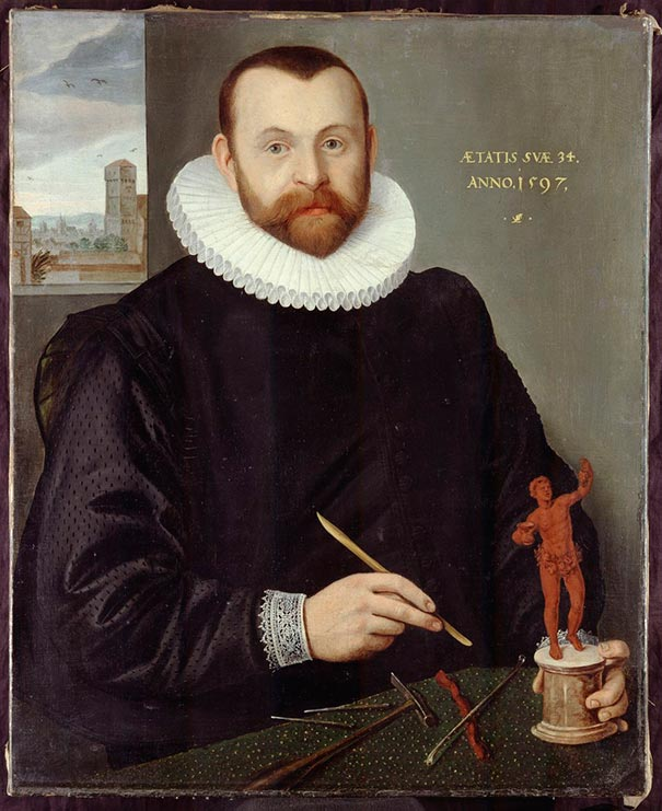 Gemälde - Portrait des Christoph Jamnitzer (1563-1618) im Alter von 34 Jahren. Museen der Stadt Nürnberg, Kunstsammlungen